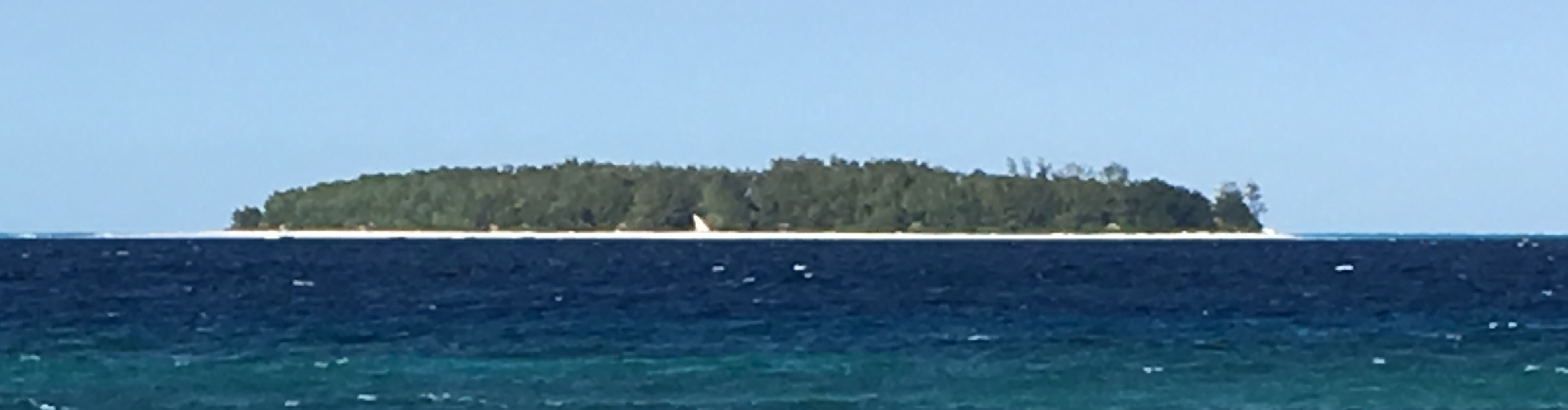 Mnemba eiland bij Zanzibar